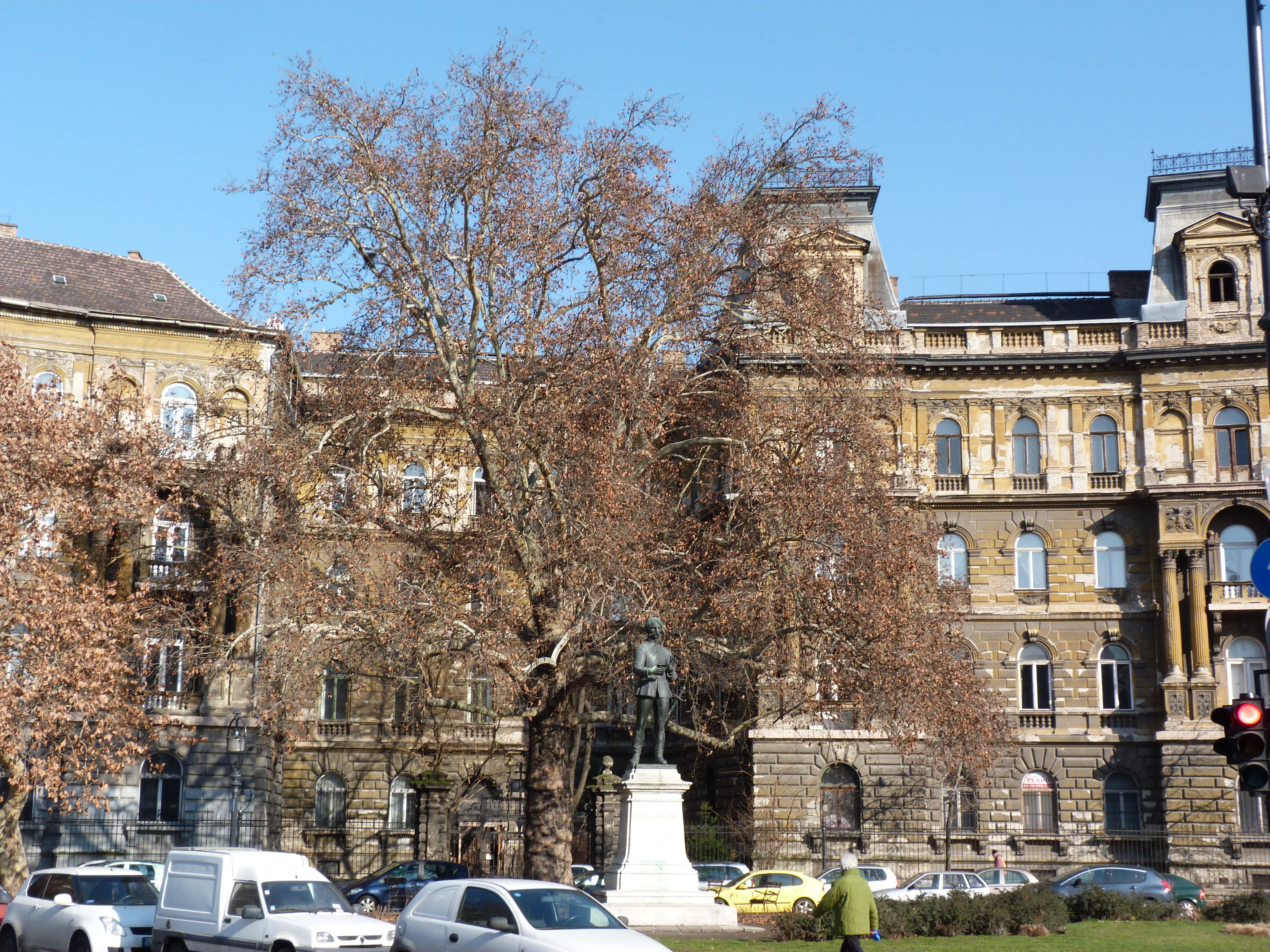 A felvétel 2014. február 24 -én készült Budapesten, a Köröndön. Andrássy út 88 -90 szám. Az Andrássy út építésének időszakában ültetett, mára már hatalmas méretűvé nőtt platánfák közül ma már csak két platán áll: az Andrássy út 92 - 94 szám és az Andrássy út 88 - 90 szám alatti házak előtti.